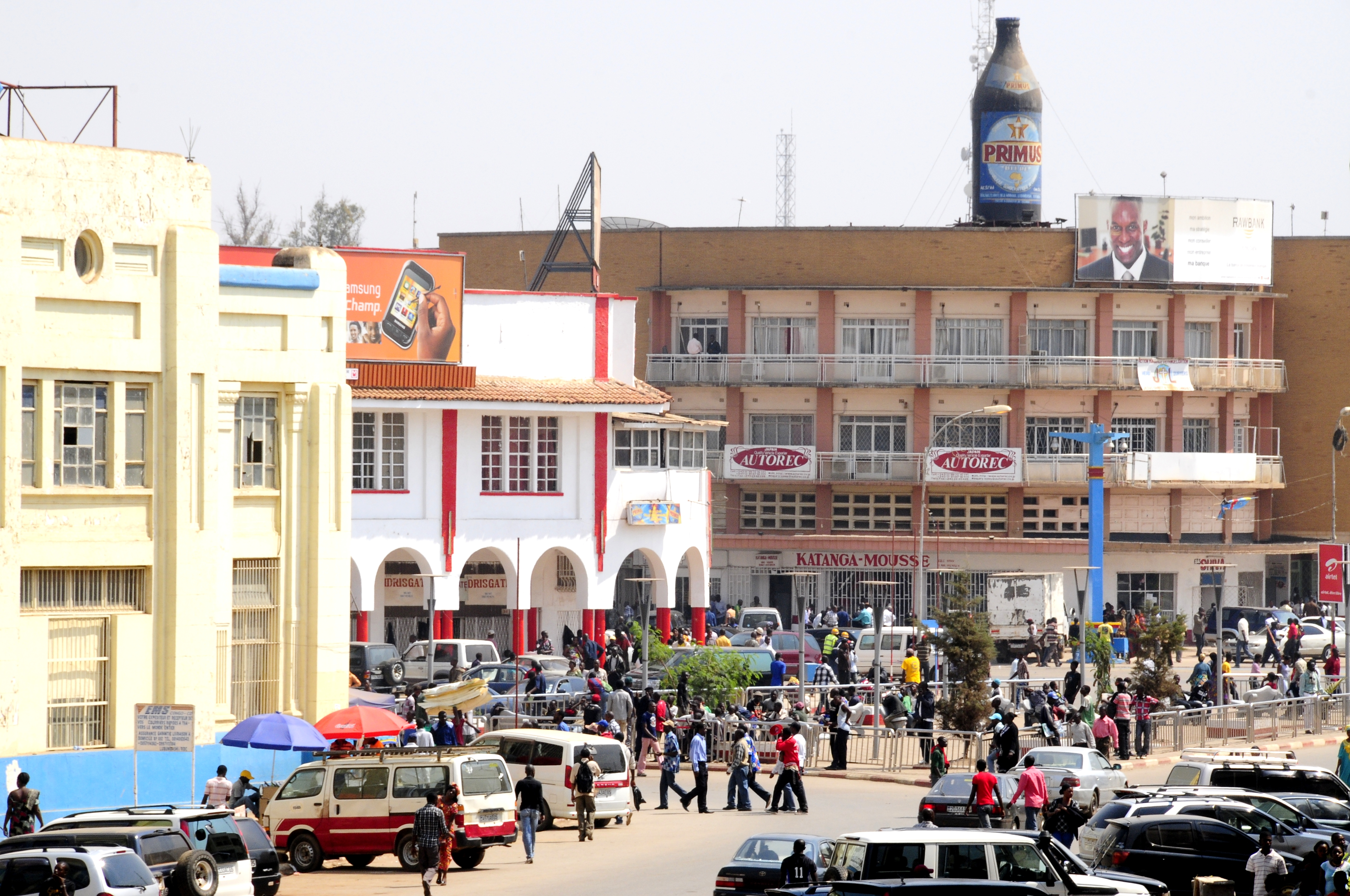 square